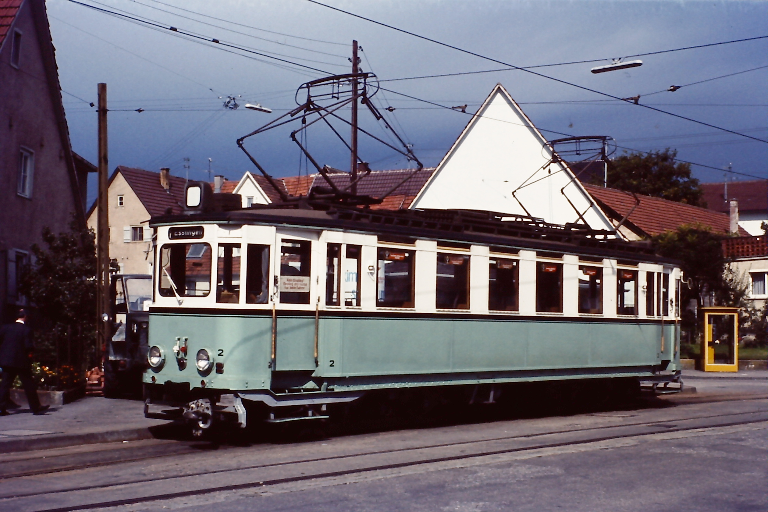 Triebwagen 2 der Straßenbahn Esslingen-Nellingen–Denkendorf in der Endhaltestelle Neuhausen, abfahrbereit nach nach Esslingen